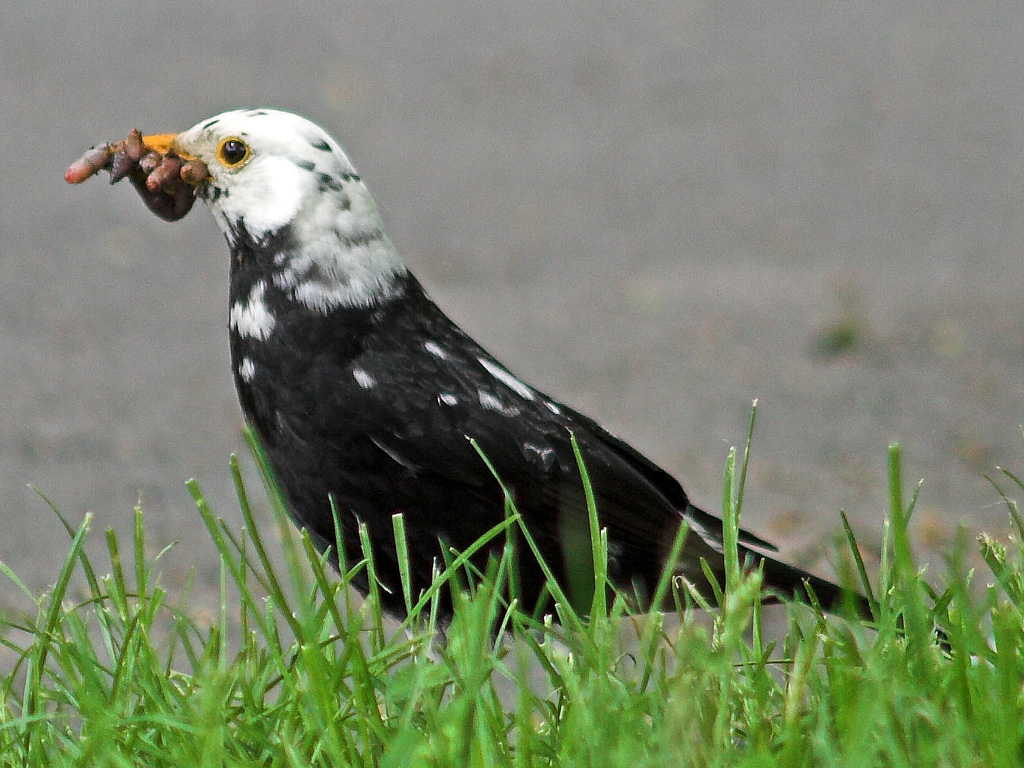 Teilalbinoamsel, fotografiert am Rosengarten in Bern/Schweiz. (Ist viel eher teilweiser Leuzismus, da bei Albinismus eine solche Scheckung schwer zu erklären wäre.)